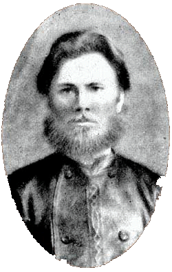 Егор Егорович Лазарев (1855—1937) — народник, эсер, делегат Всероссийского Учредительного собрания, министр просвещения в КОМУЧе, политэмигрант, редактор.